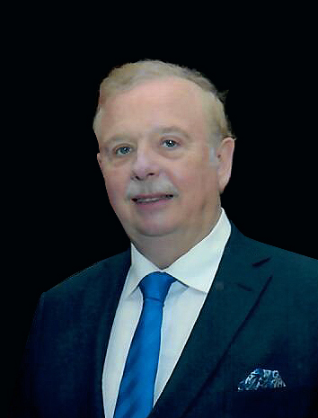 Fotografia - portret